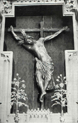 Escultura románica del Cristo de San Pedro en su antiguo enclave de la iglesia de San Pedro en Sanlúcar la Mayor.